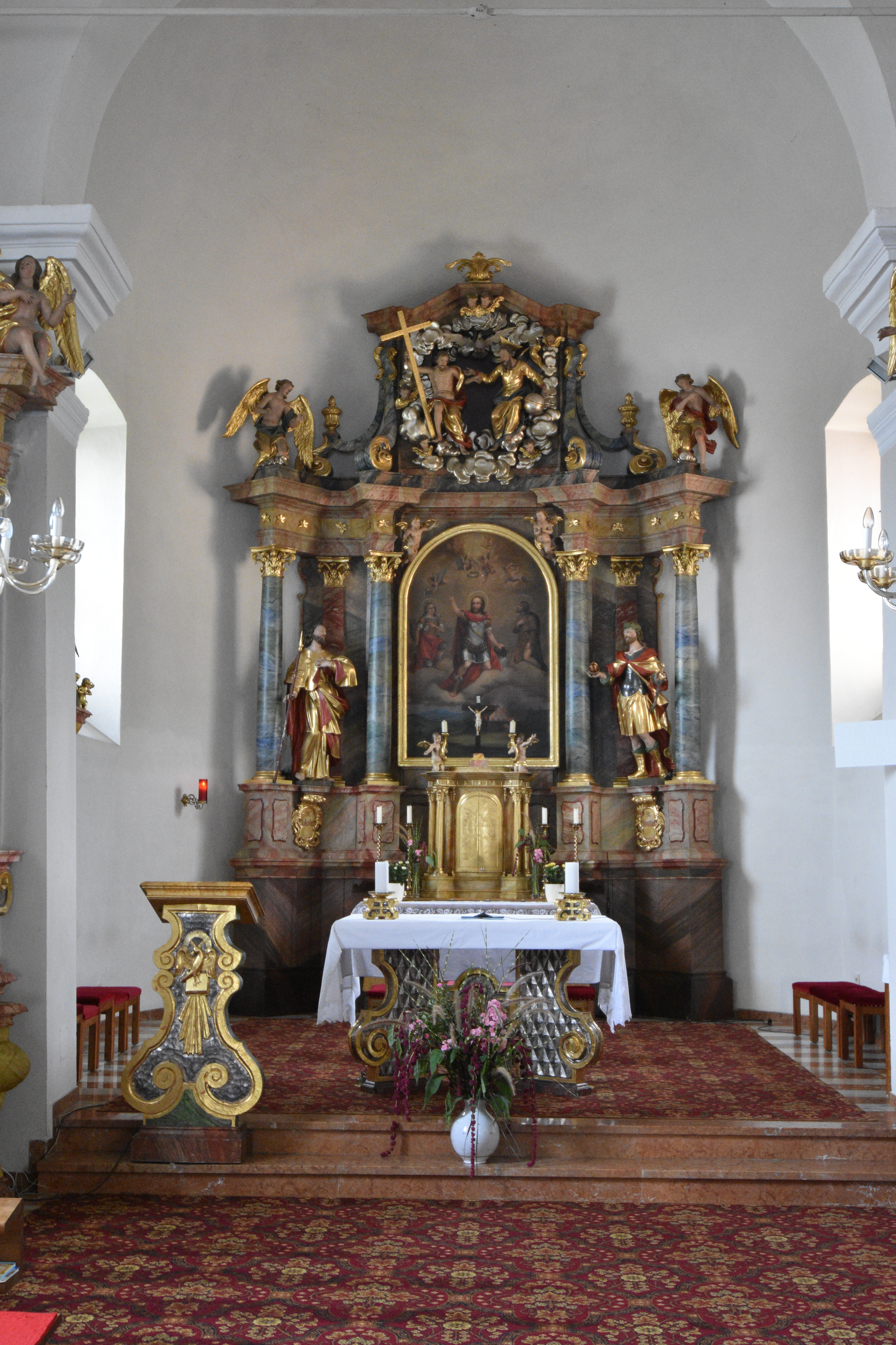 Kath. Pfarrkirche hl. Florian Loipersdorf - Interior